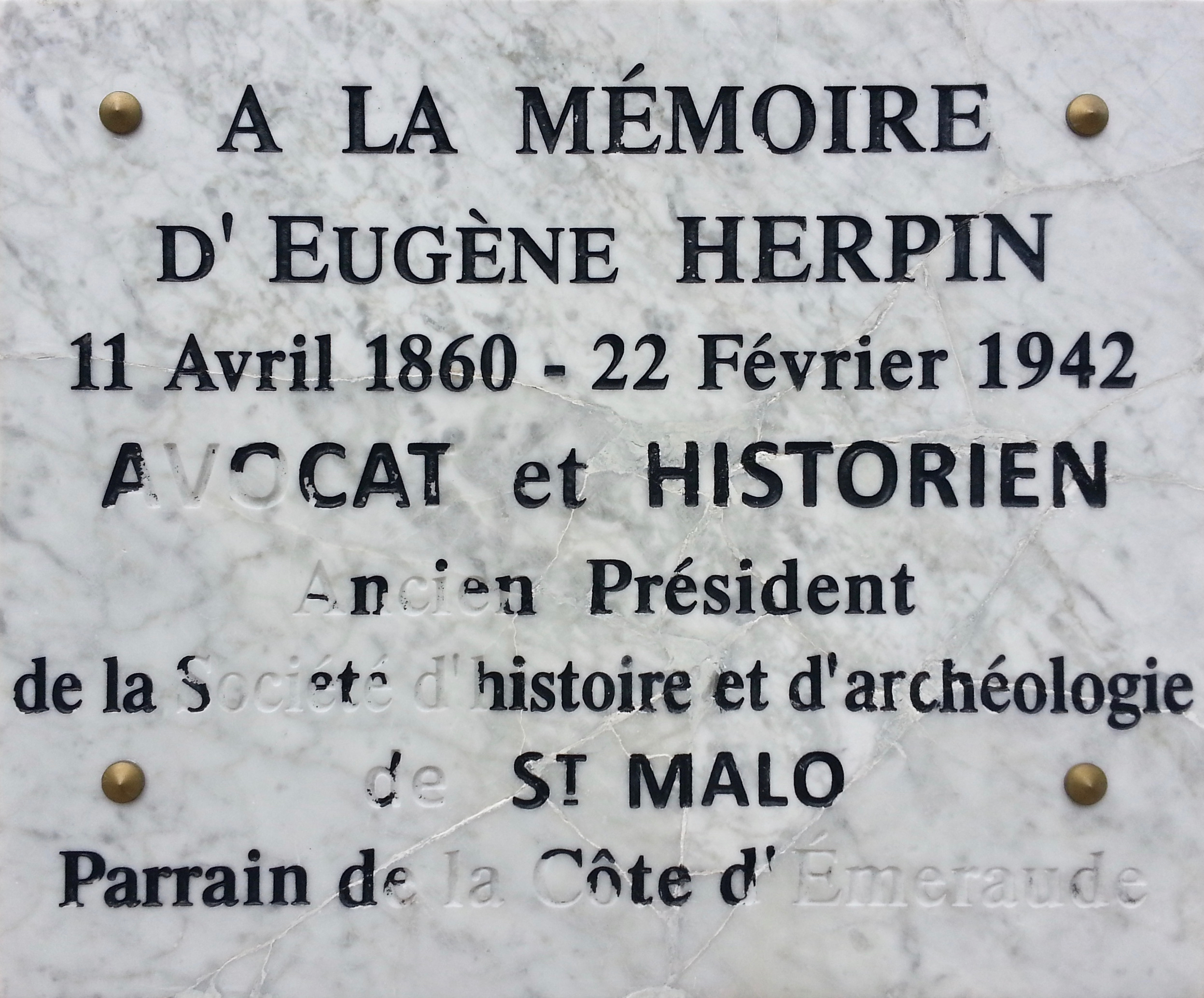 Plaque à la mémoire d'Eugène Herpin sur le mur de sa maison, à coté de l'ancienne mairie de Paramé, à Saint-Malo.